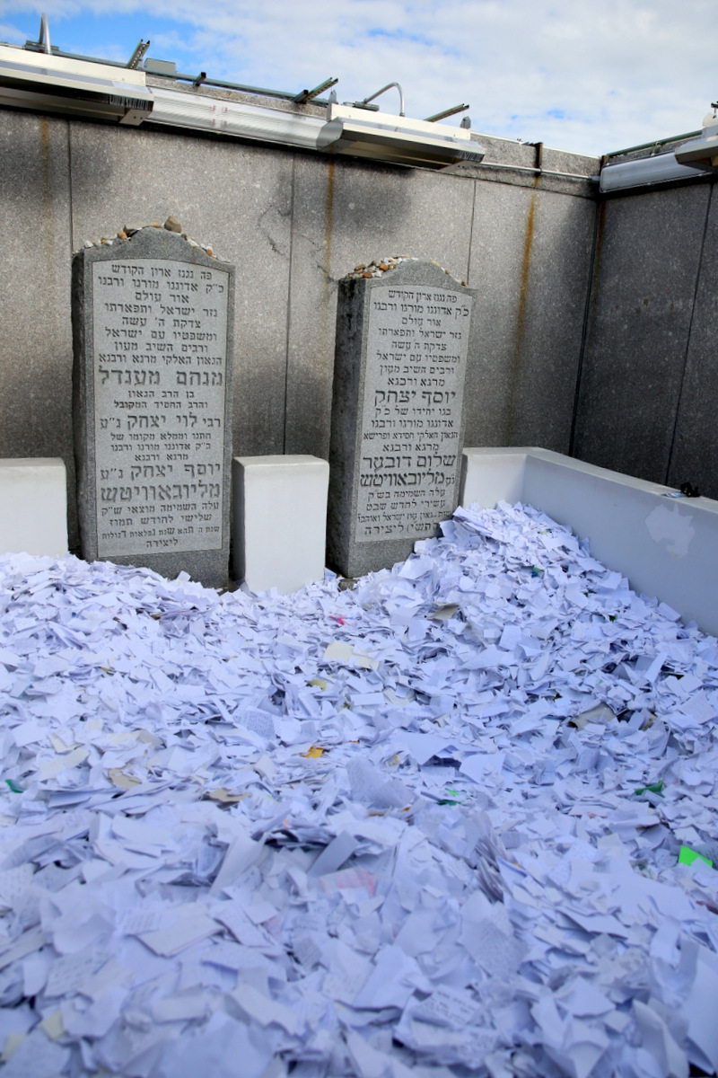 פתקים בתוך אוהל הרבי מליובאוויטש